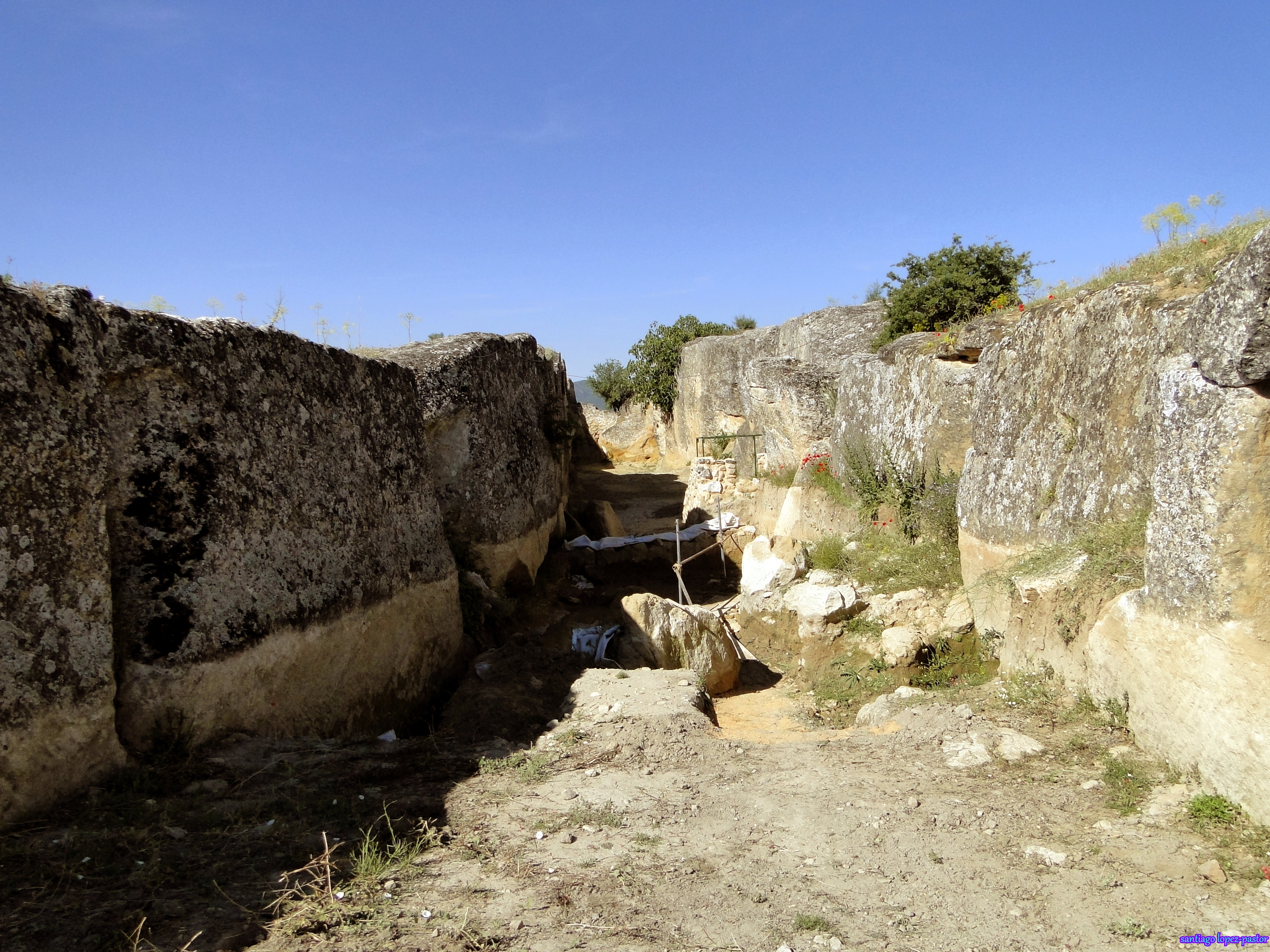 El yacimiento arqueológico de "La Cava" se encuentra en la Alcarria conquense, en la Sierra de Altomira muy próximo a la frontera con la provincia de Guadalajara, cerca del pueblo de Garcinarro. Es un yacimiento con elementos de distintas épocas. Por ejemplo una piedra retallada para asemejarse a una serpiente, posiblemente de época íbera. Un poco y una cantera de epoca romana. Eremitorios y una necrópolis de época visigoda. Lo más relevante son tres estancias talladas en la roca identificadas con un santuario religioso íbero del año 450-400 a.C., y una enorme estancia con muros de más de 4 metros de altura igualmente tallados en la roca y de dudosa funcionalidad.